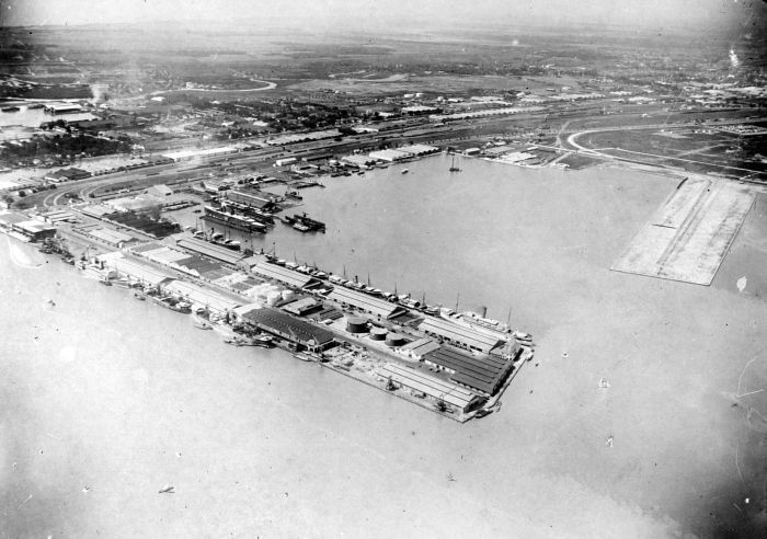 Repronegatief. Tandjoengperak, de haven van Soerabaja, Oost-Java